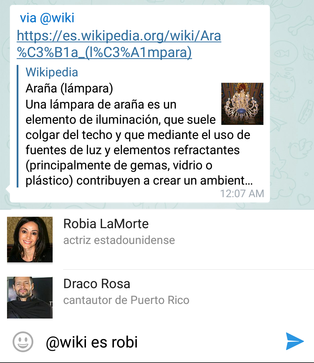 Un bot integrado para compartir un artículo de Wikipedia en Telegram para Android. En este captura se aprecia su funcionamiento adoptado en enero de 2016.